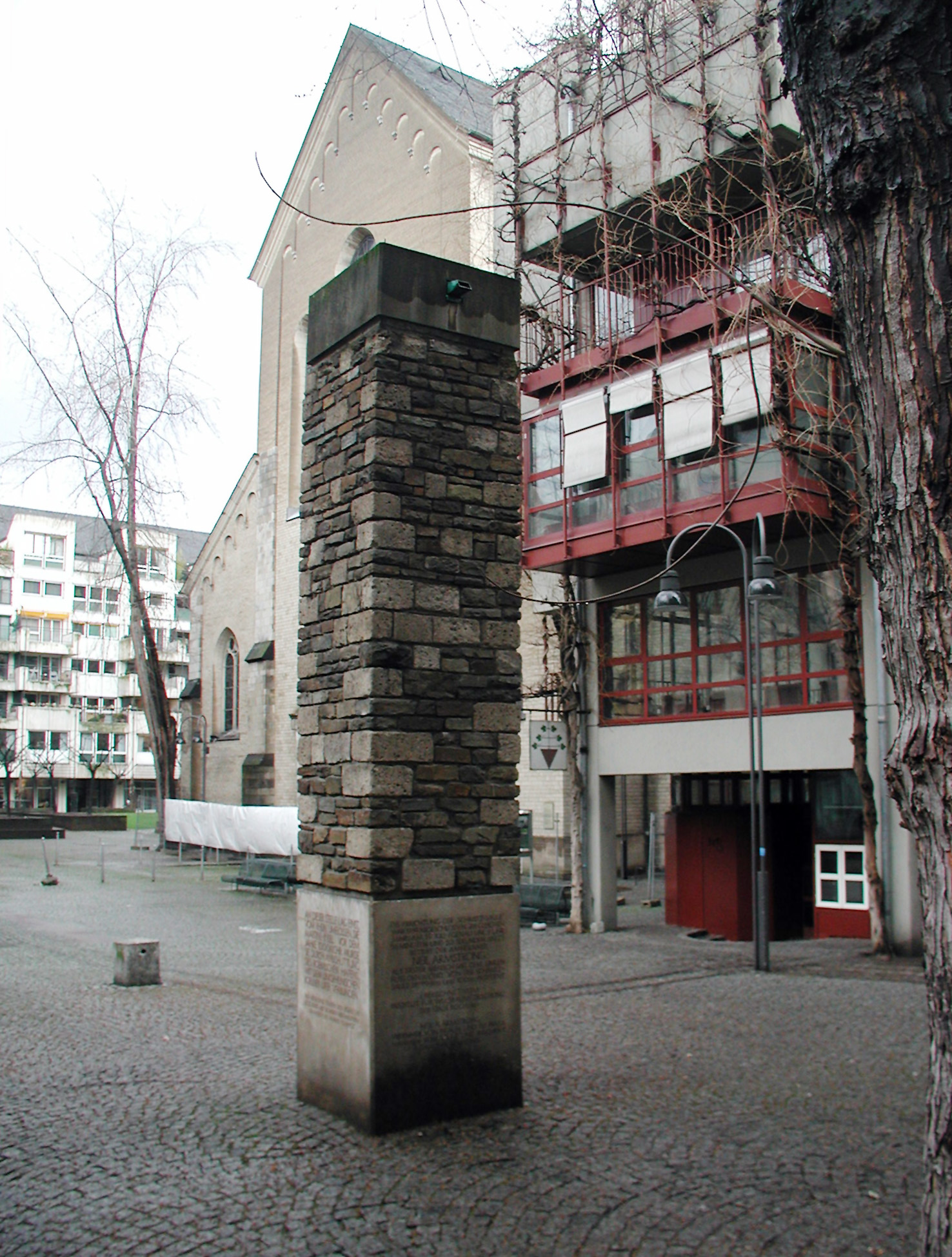 Köln-Martinsviertel, Säule als Markierung des Mittelpunktes der ehemaligen Rheininsel (sog. "Schmitzsäule" mit Markierungen von Hochwasserständen).